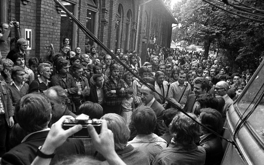 Delegacja strony rządowej w składzie: Mieczysław Jagielski – wicepremier rządu, Klemens Gniech – dyrektor Stoczni Gdańskiej im. Lenina oraz Tadeusz Fiszbach – I sekretarz komitetu Wojewódzkiego PZPR w Gdańsku udaje się do Sali BHP na rozmowy z przedstawicielami MKS